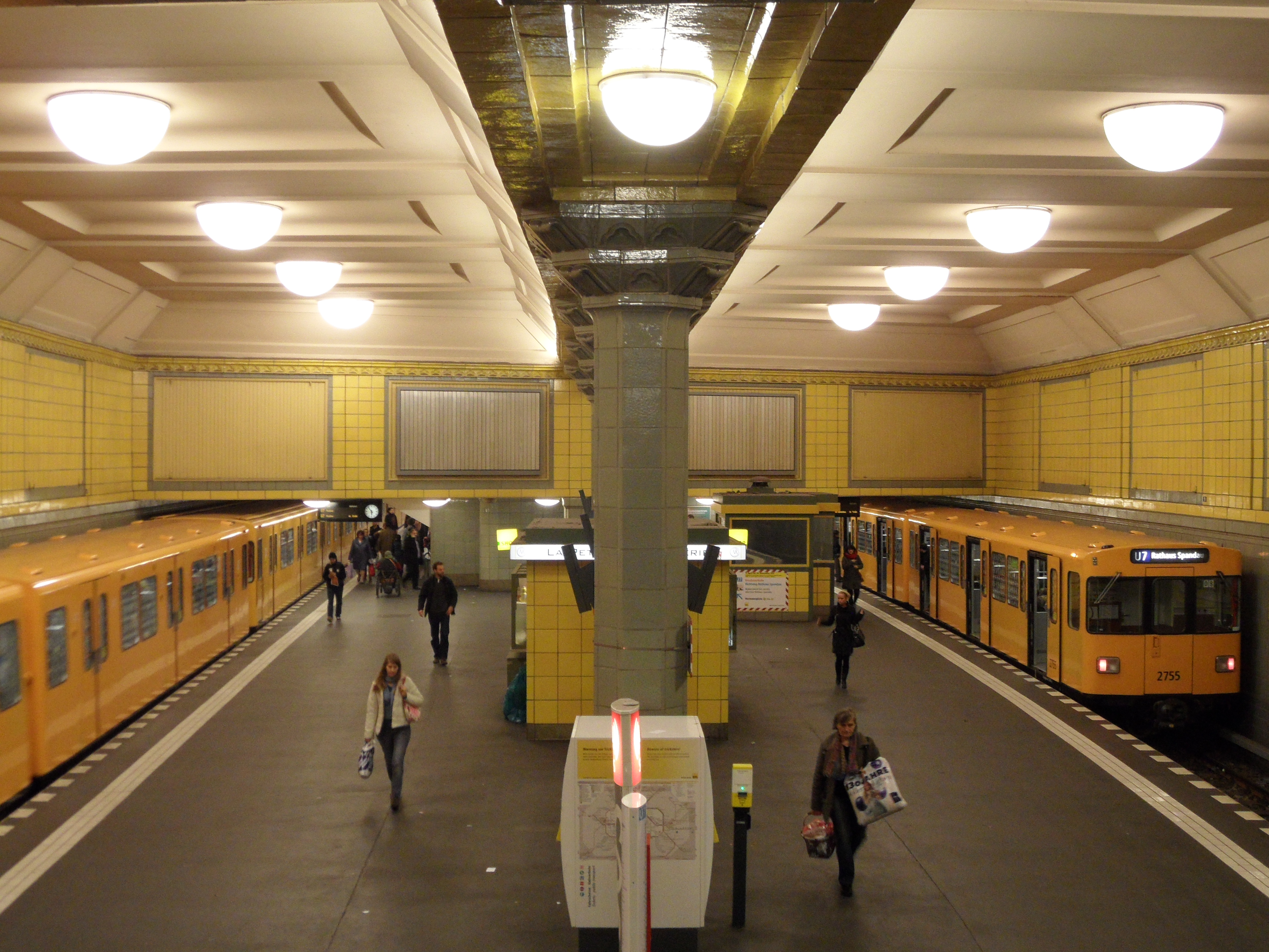 Berlin - U-Bahnhof Hermannplatz - Linien U7 und U8